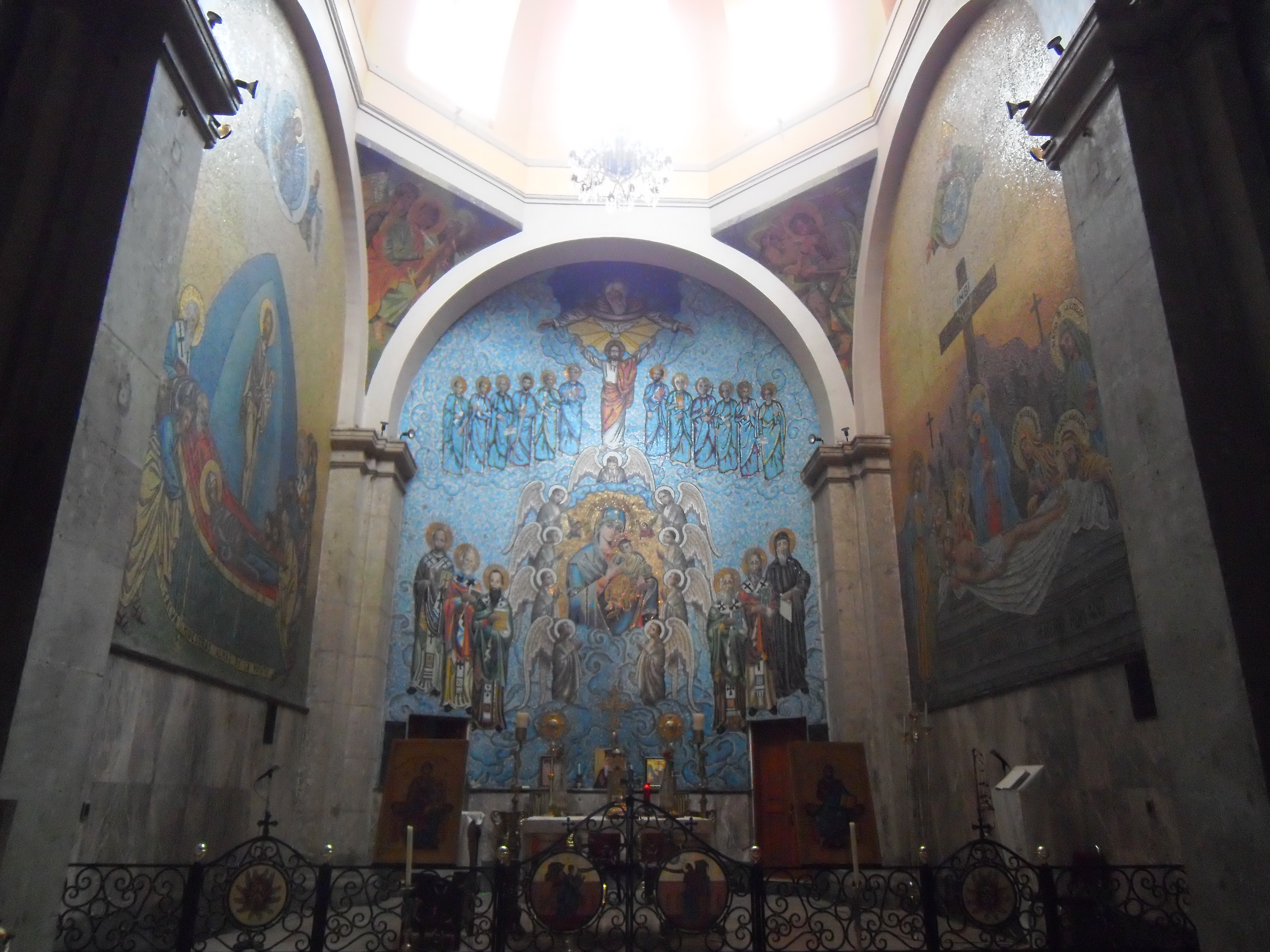 Interior del Templo de Porta Coeli